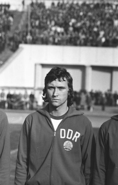 Fußballer Gerd Weber ADN-ZB/Kluge/17.10.1975/Berlin: Fußballnationalspieler der DDR/Gerd Weber, SG Dynamo Dresden. [Fußballnationalspieler der DDR/Gerd Weber] Abgebildete Personen: Weber, Gerd: Fußballspieler, SC Dynamo Dresden, Olympiateilnehmer 1976, DDR